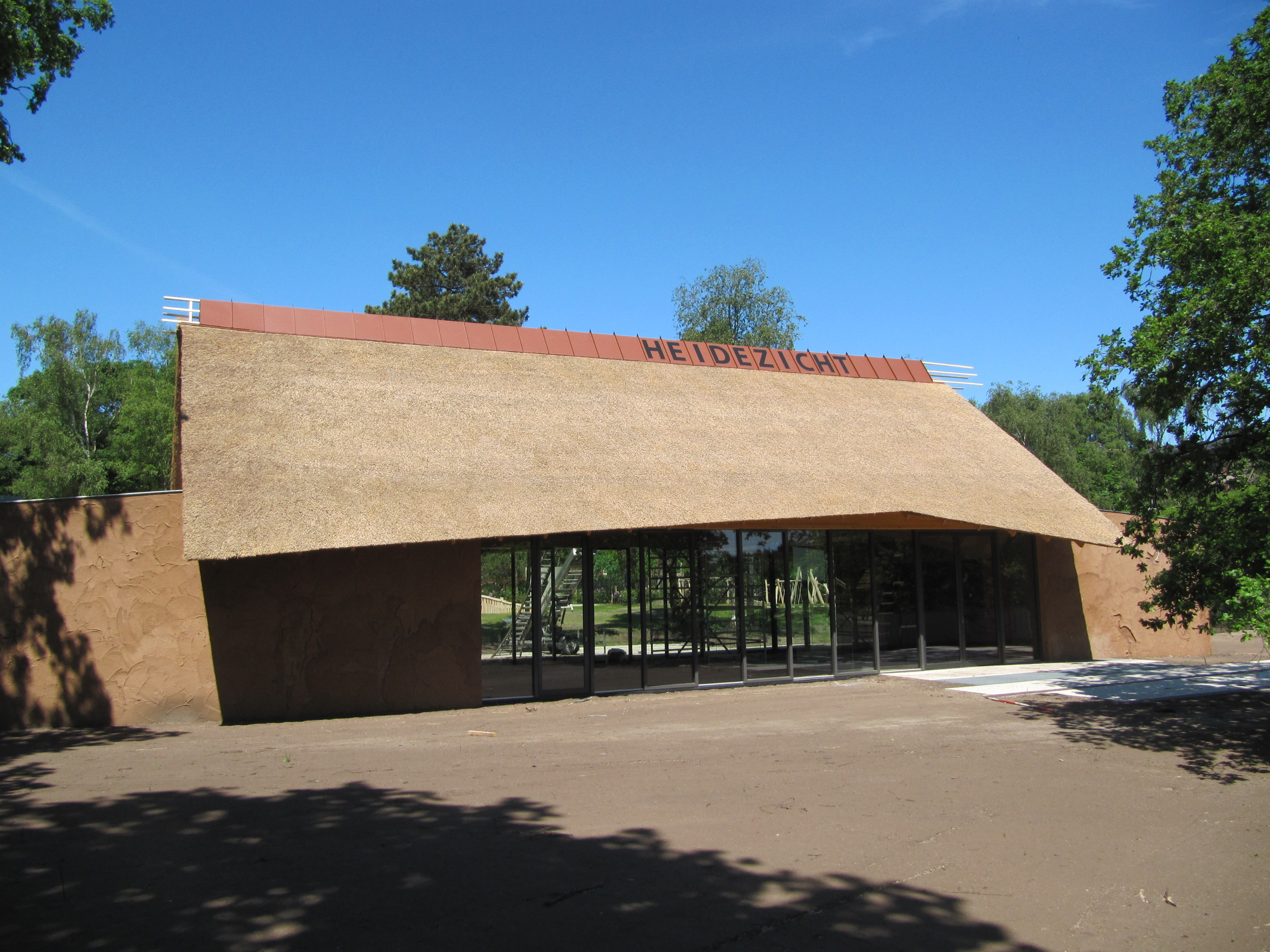 Heidezicht